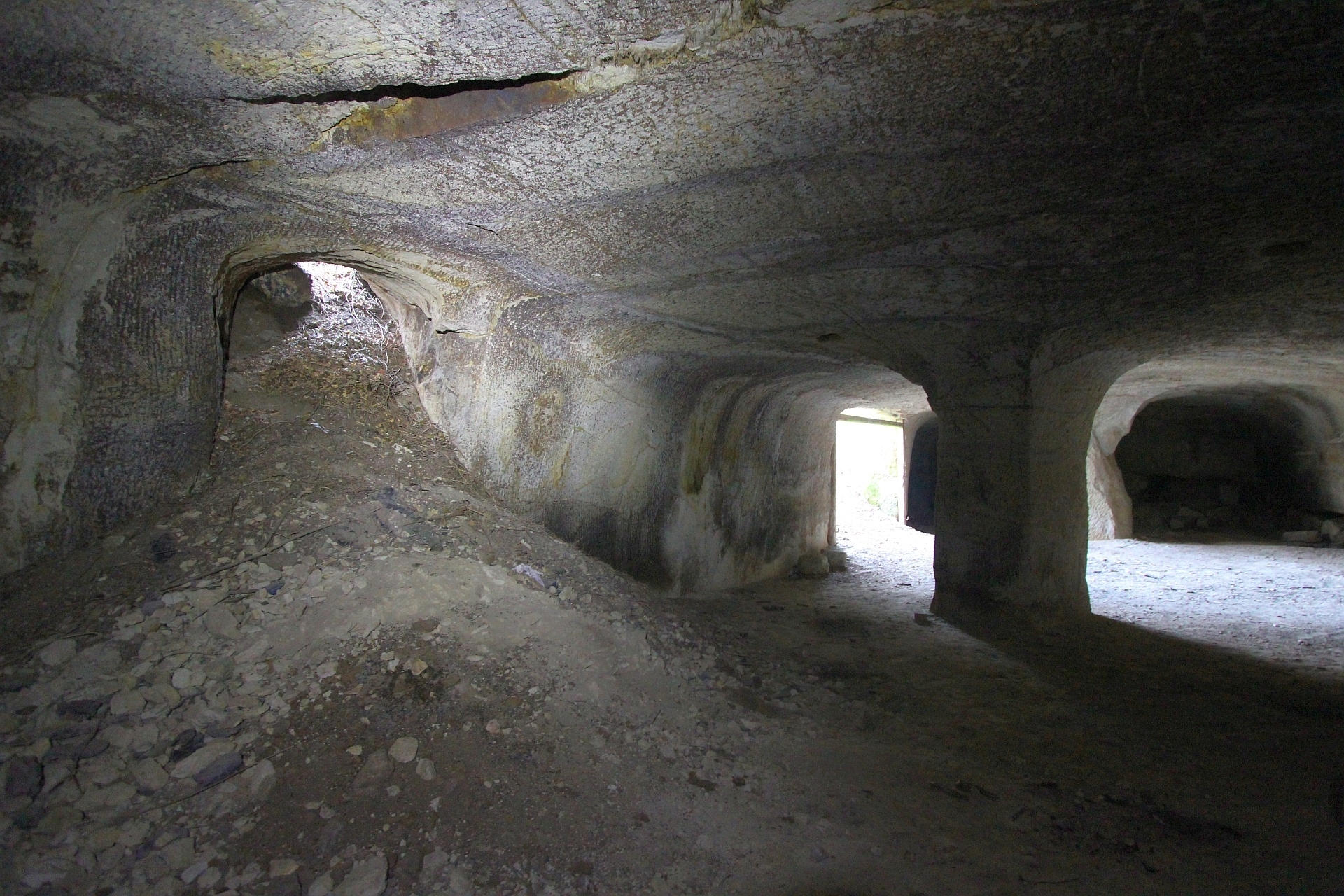 Kőhodály nevű menedék Andornaktálya határában